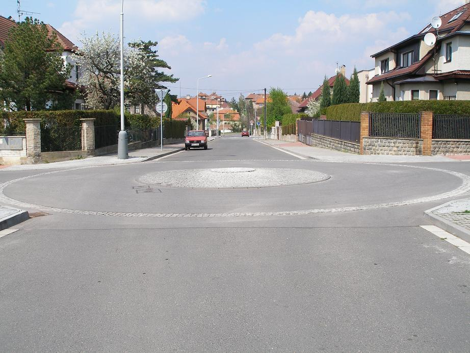 Miniokružní křižovatka v Praze 4 - Modřanech, ulice Na Havránce, pohled od křižovatky s ulicí Nad Rážákem směrem ke křižovatce s ulicí Pískovou.